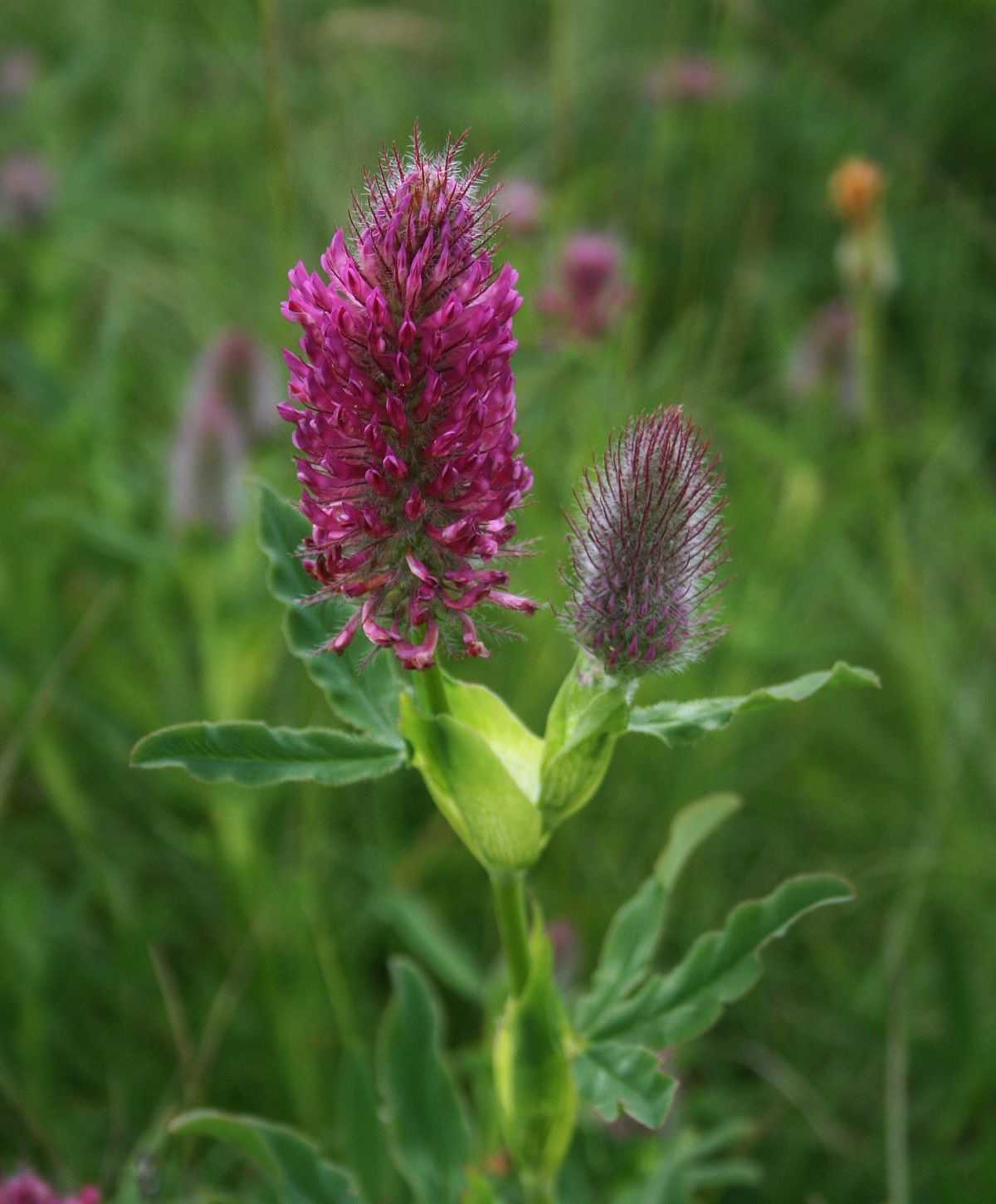 Purpur-Klee (Trifolium rubens), Hülsenfrüchtler (Fabaceae), Schmetterlingsblütler (Faboideae) - Slowenien/Slovenija/Slovenia: Primorska, Podgorje